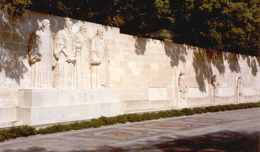 Parc des Bastions (mur des Réformateurs, Genève).